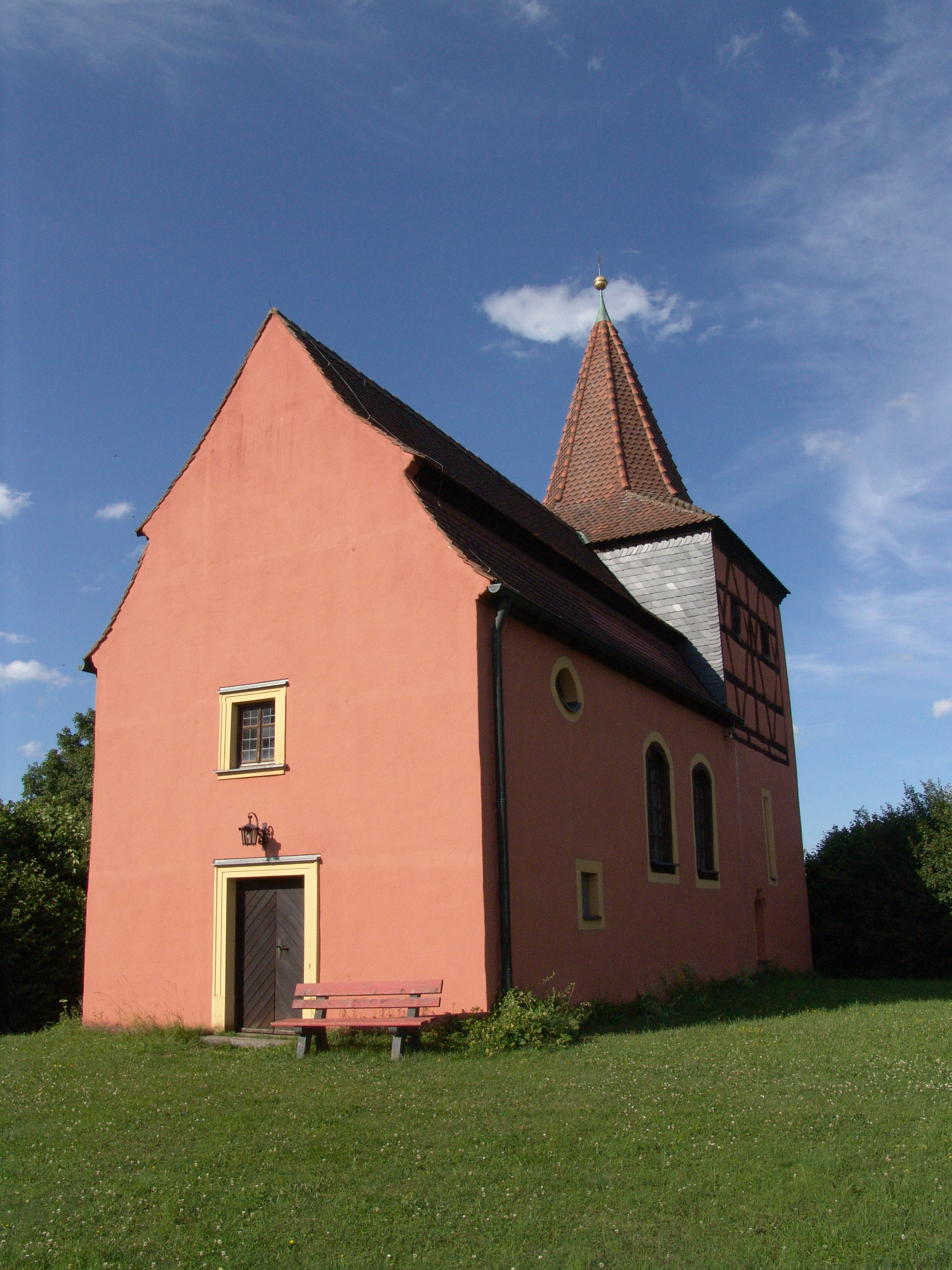 Kirchrimbach St. Mauritius